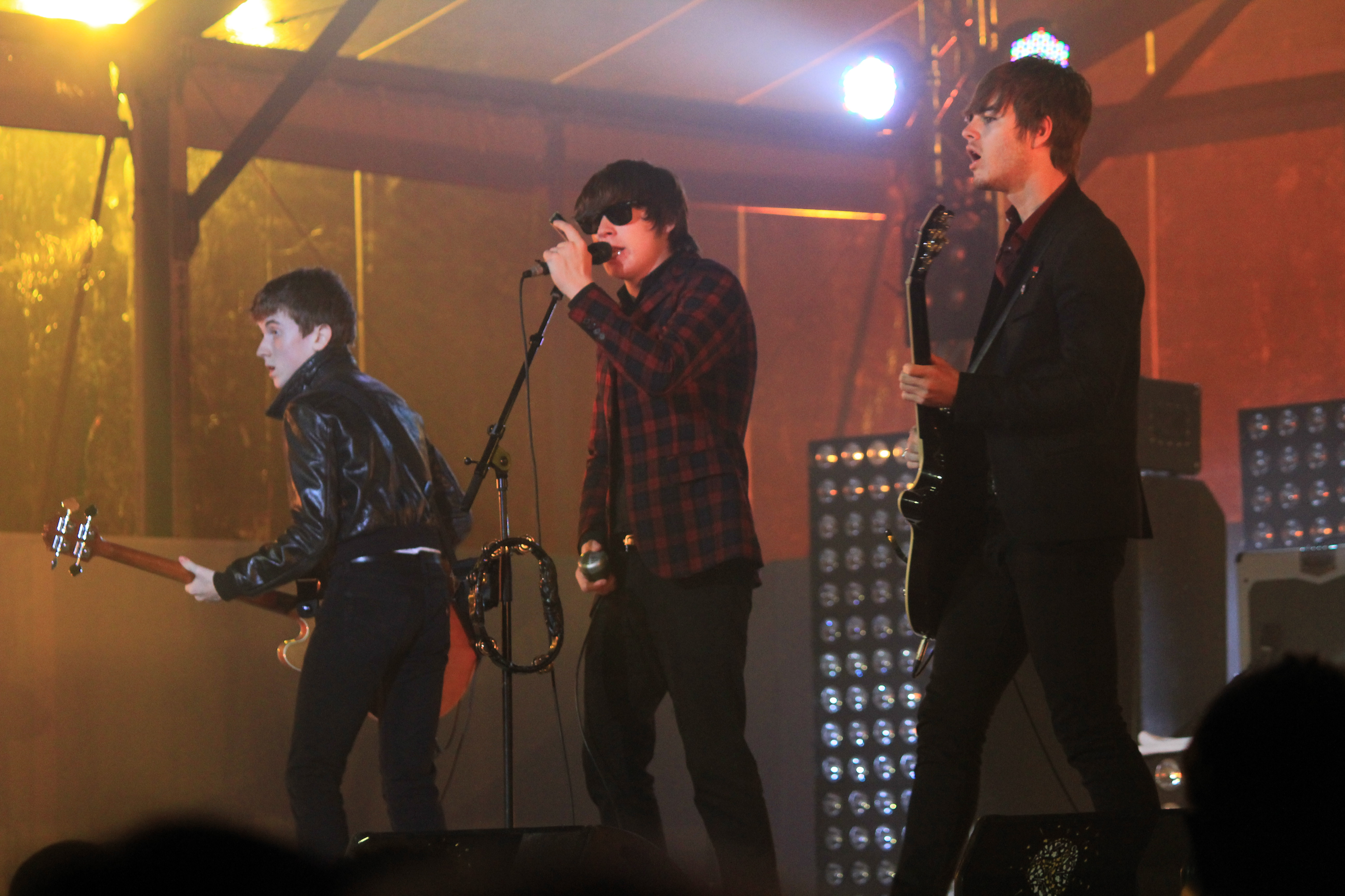 Concert de The Strypes lors du festival interceltique de Lorient 2014.